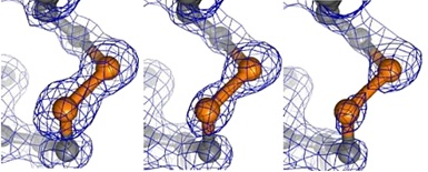 Cambios en los mapas de densidad electrónica de un puente S-S en la insulina.